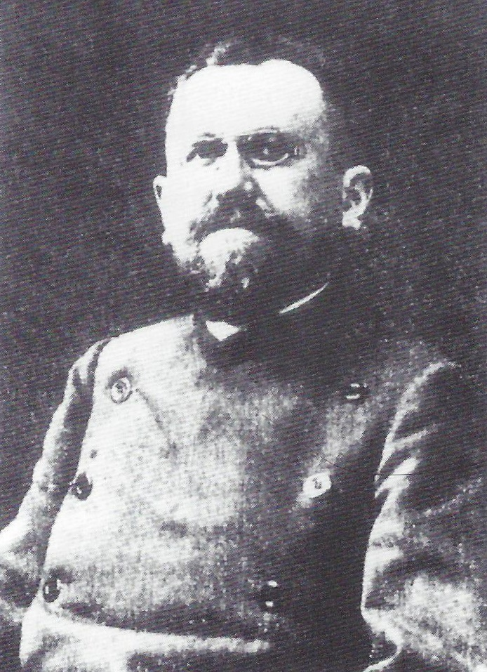 Porträtfotografie von Prof. Dr. Karl Friedrich Foehr (1860–1930), Direktor und Rektor des Friedrichs-Polytechnikums Köthen.